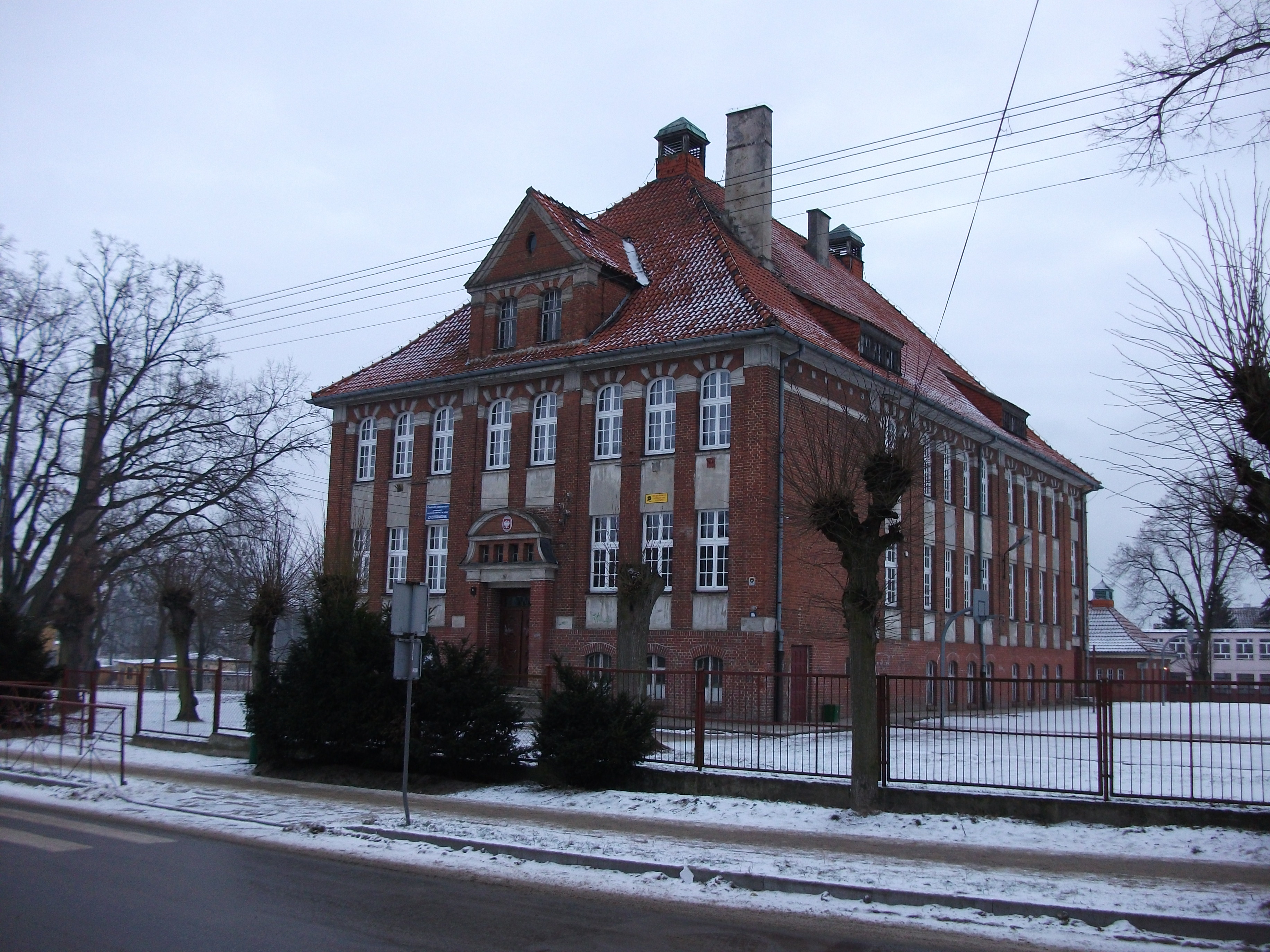 Szkoła w Kisielicach